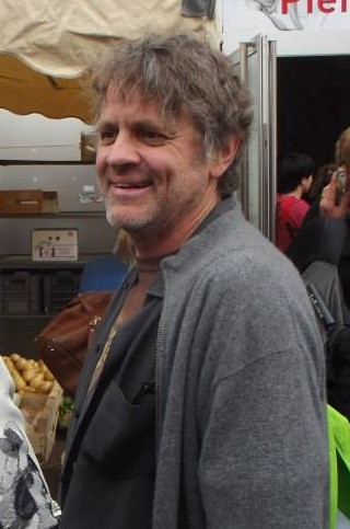 Chris Wedge au Festival International du Film d'Animation d'Annecy le 12 juin 2013